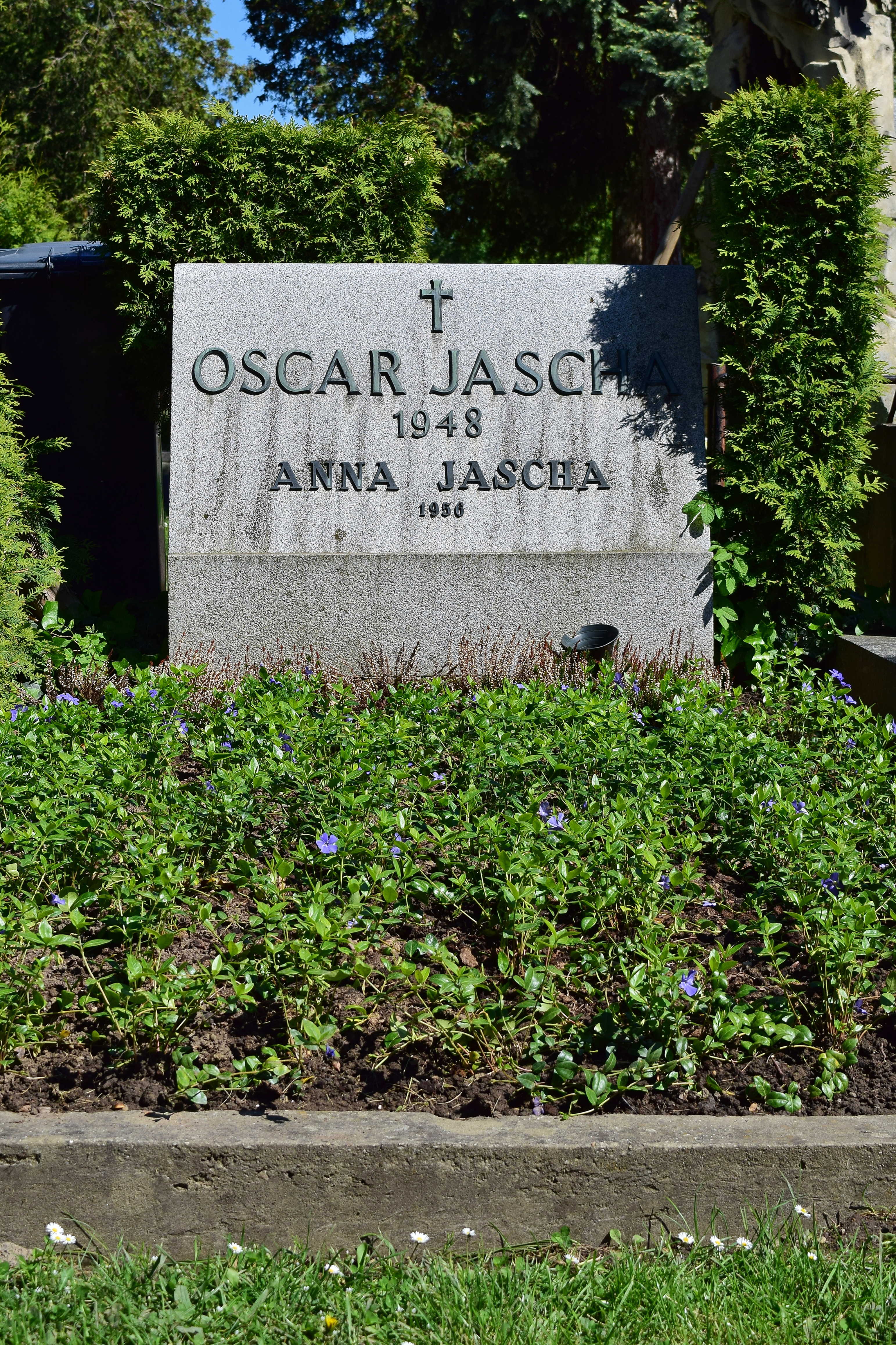 Ehrenhalber gewidmetes Grab von Oskar Jascha auf dem evangelischen Friedhof im Wiener Zentralfriedhof